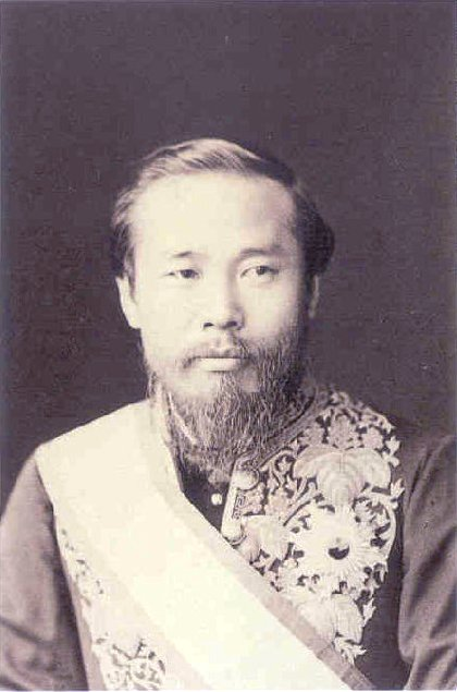 Graf Itō Hirobumi (jap. 伊藤 博文, bzw. in respektvoller Lesung[1] Itō Hakubun; * 16. Oktober 1841 (traditionell: Tempō 12/9/2) in Hagi; † 26. Oktober 1909 in Harbin) war ein Samurai und japanischer Politiker der Zeit des Bakumatsu und in der Anfangsphase des Japanischen Kaiserreiches. Itō wurde im Jahr 1885 der erste Premierminister von Japan und bekleidete dieses Amt bis 1901 insgesamt viermal. Er war eine der bedeutendsten Persönlichkeiten der Meiji-Zeit, in der Japan zur imperialistischen Großmacht in Ostasien wurde.